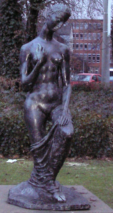 Wilhelm Lehmbruck: "Kniende" (Original 1911 - Bronze 1925 in Duisburg/Germany aufgestellt)